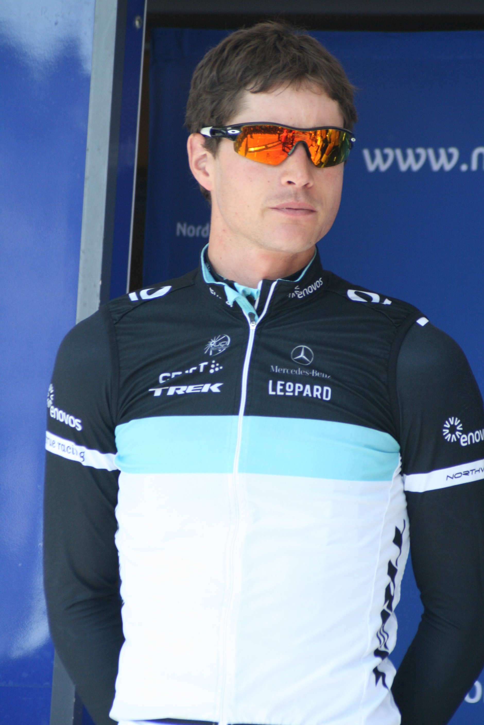 Présentation des coureurs au départ de la première étape William Clarke